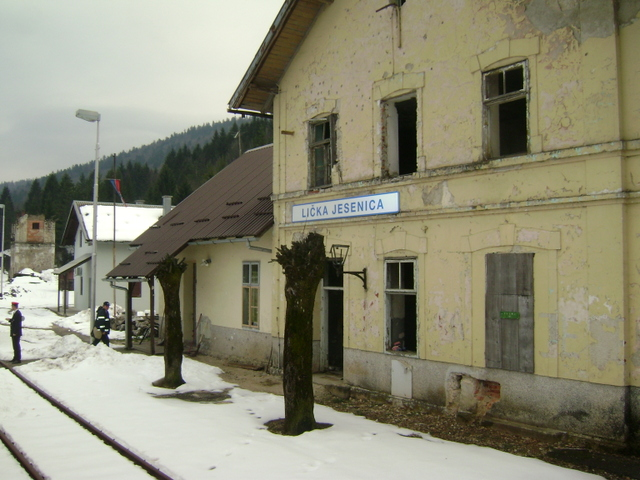 Kolodvor Lička Jasenica na Ličkoj pruzi